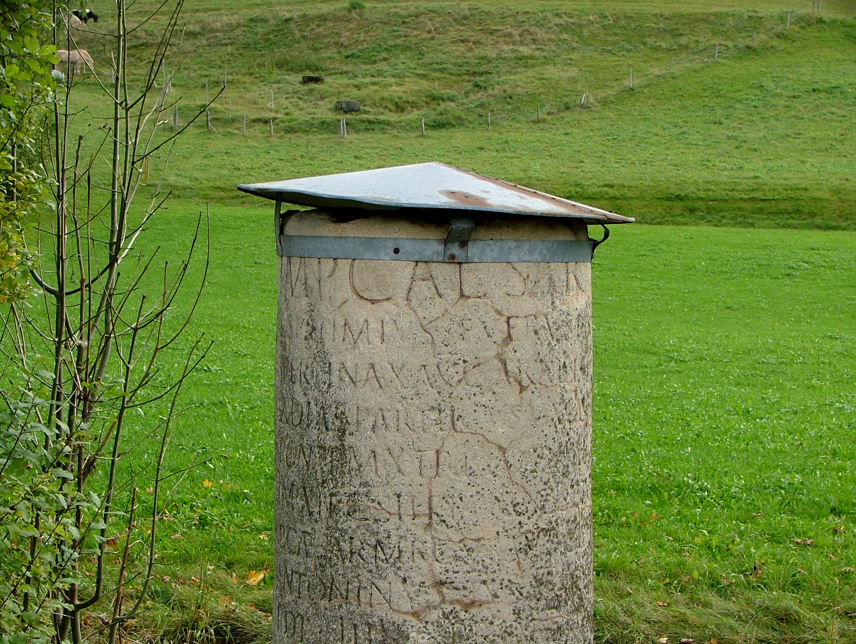 Meilenstein